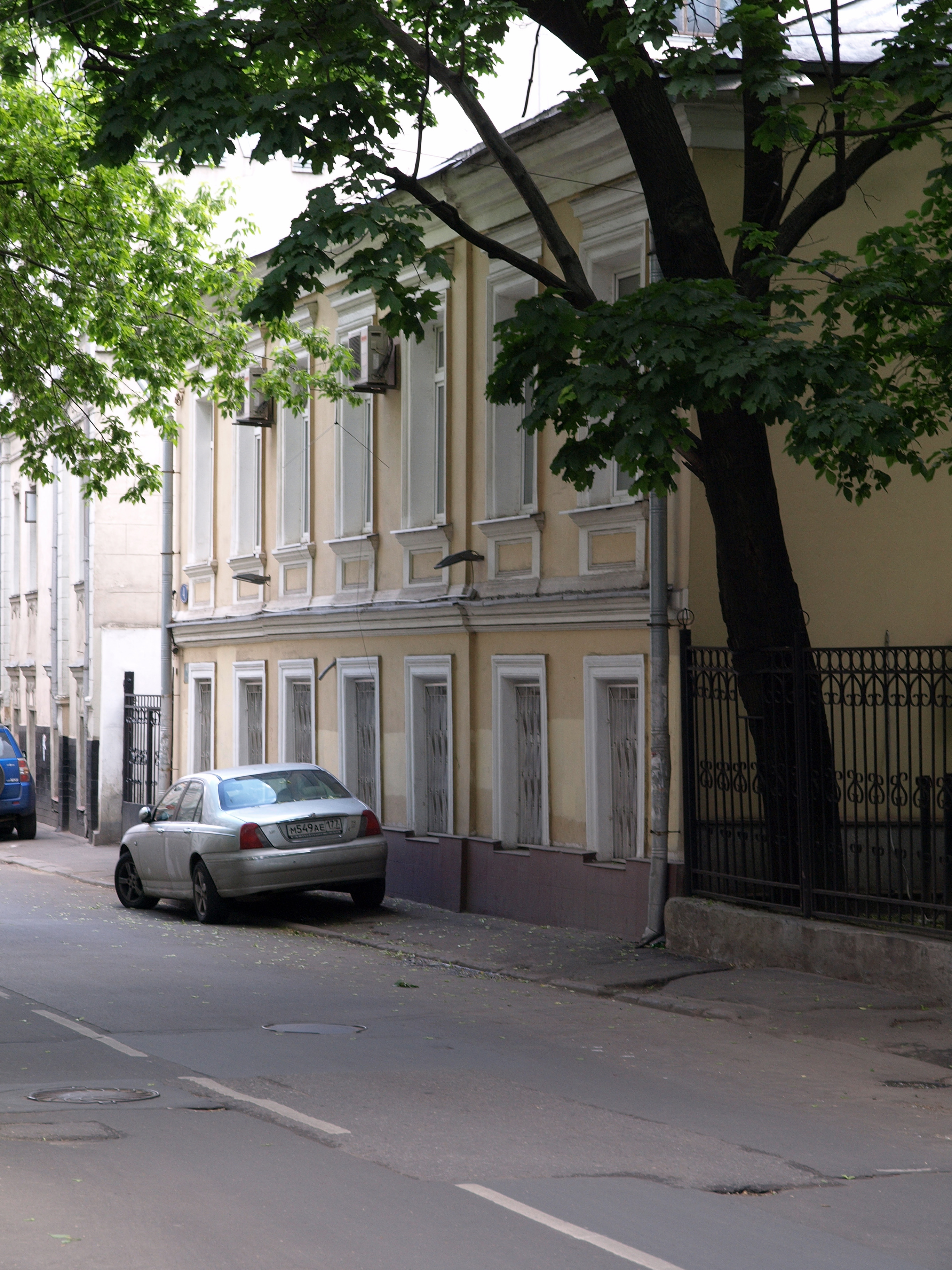 Potapovsky Lane, Moscow